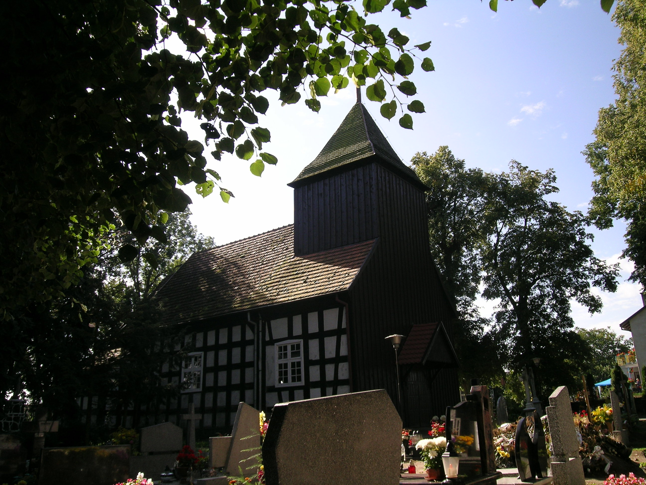 Ciechocin - kościół p.w. św. Marcina